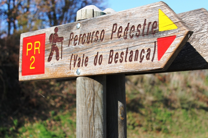 Percursos Pedestres - Vale do Bestança